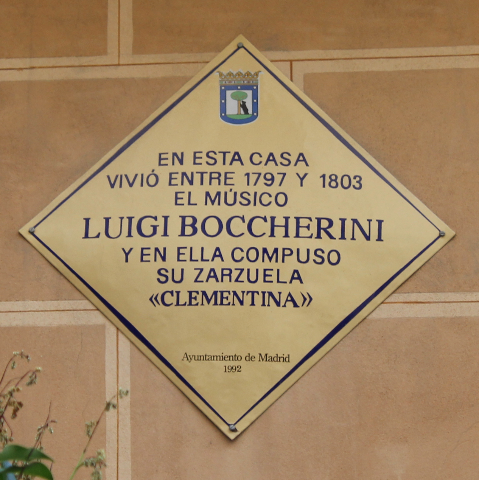 Placa conmemorativa de Luigi Boccherini, Madrid.